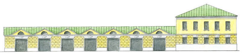 Восточная сторона Хитровской площади. Торговые ряды Александра Павловича Протасова. 1837 год.